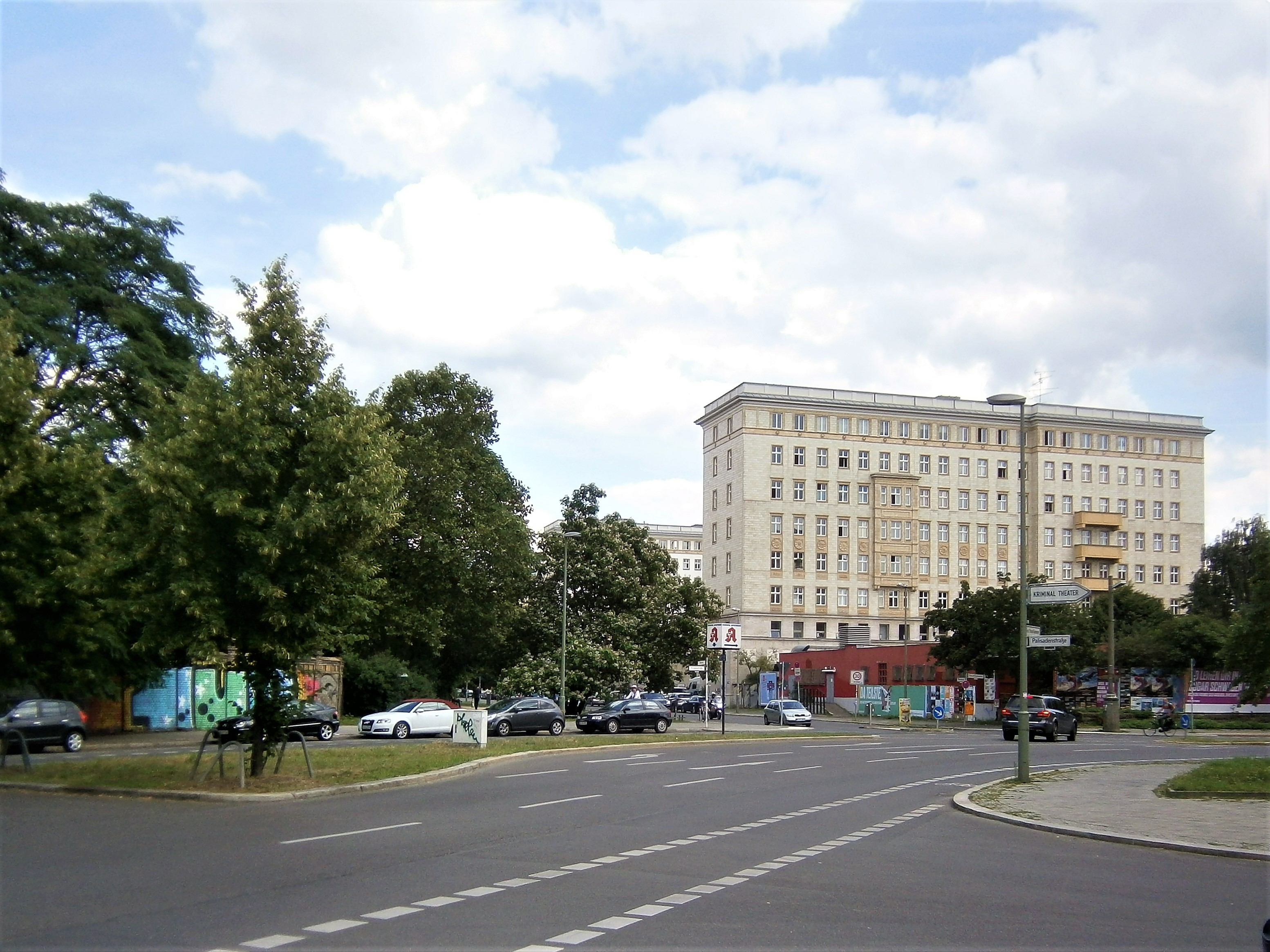 Die Friedenstraße ist eine Straße im Berliner Bezirk Friedrichshain-Kreuzberg, Ortsteil Friedrichshain. Angelegt und benannt wurde sie 1871-1876 auf dem Communicationsweg außerhalb der abgerissenen Berliner Zollmauer. Bereits seit dem Anlegen und der Bebauung bestand eine Teilung der Straße auf Königstadt und Stralauer Viertel. Aktuell sind es drei unterschiedene Straßenabschnitte: regionale Straßenverbindung im Barnimkiez am Volkspark Friedrichshain, am Platz der Vereinten Nationen als Parkzone, südlich im (Planungsraum) "Friedenstraße" als Ergänzungsstraße. Das Bild zeigt den an der Stalinallee errichteten Wohnblock durch den die Friedenstraße an die Kreuzung Weridenweg/ Fruchtstraße/ Palisadenstraße verkürzt wurde.